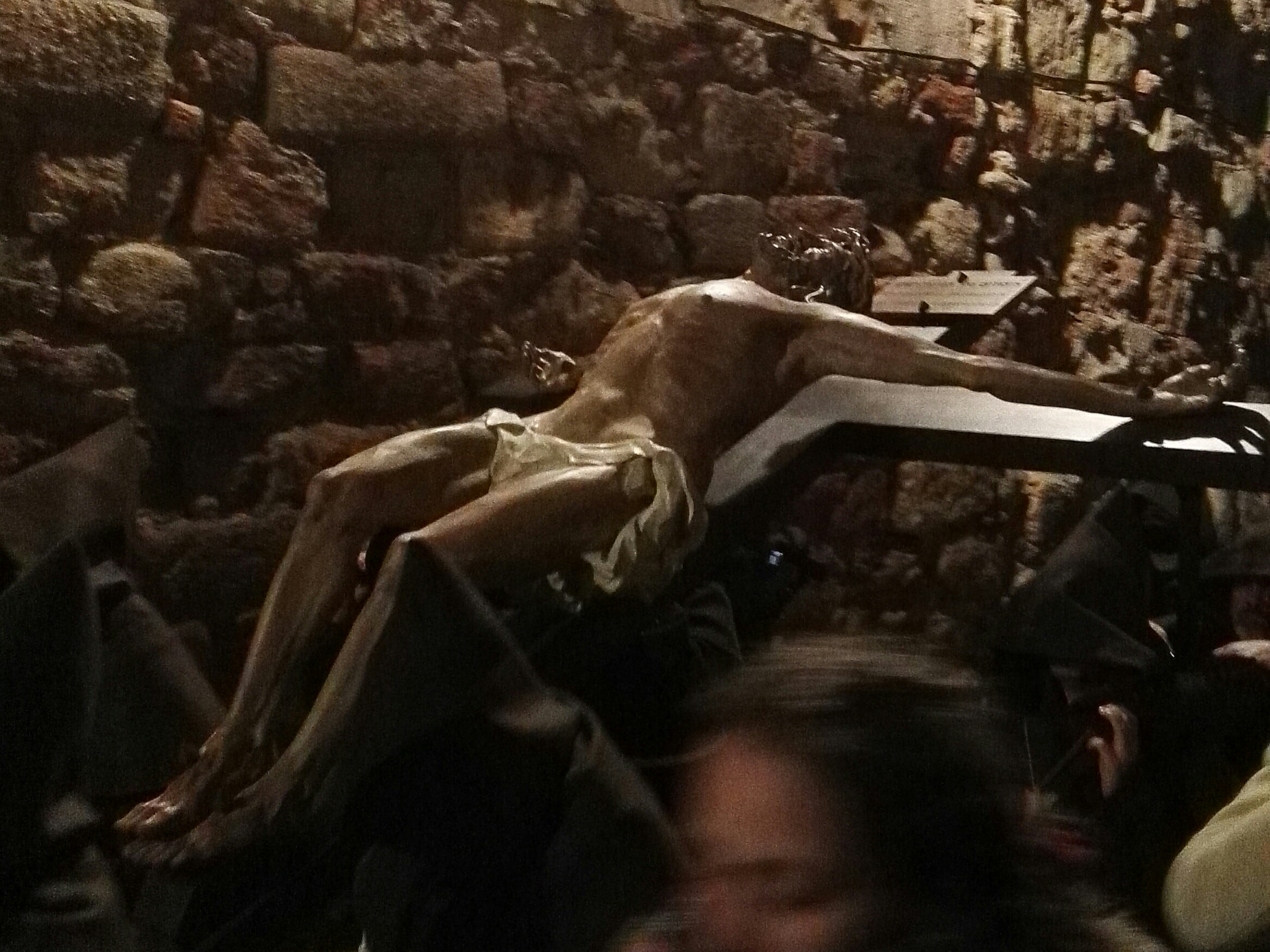 Cristo de la Humildad, en su primer desfile procesional el Sábado de Pasión de 2018. Obra de Fernando Mayoral para la Hermandad Franciscana. Salamanca